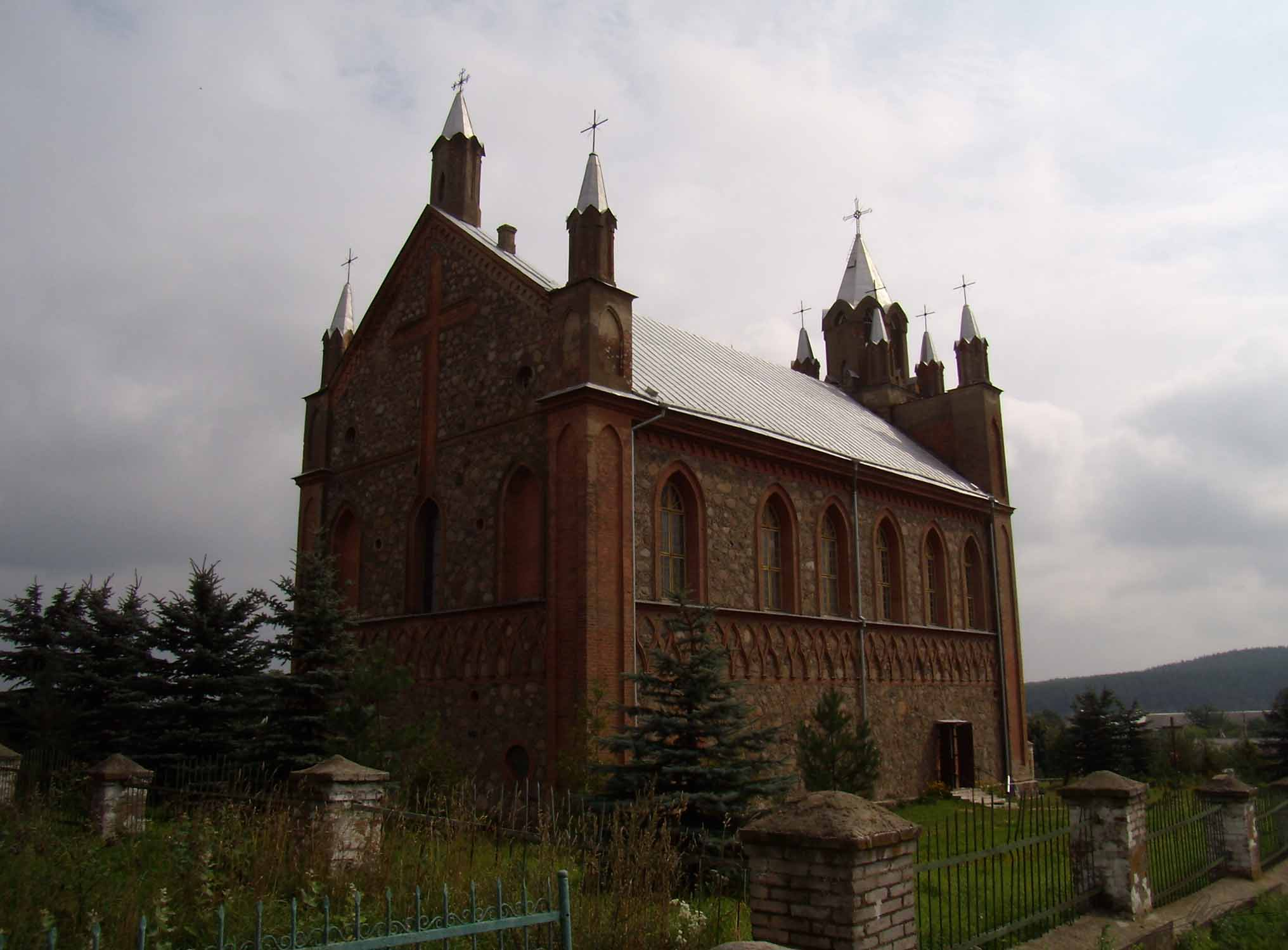 Жупраны, касцел Свв. Апп. Пятра i Паўла (1854-75) - Zhuprany, church of SS Peter and Paul (1854-75)